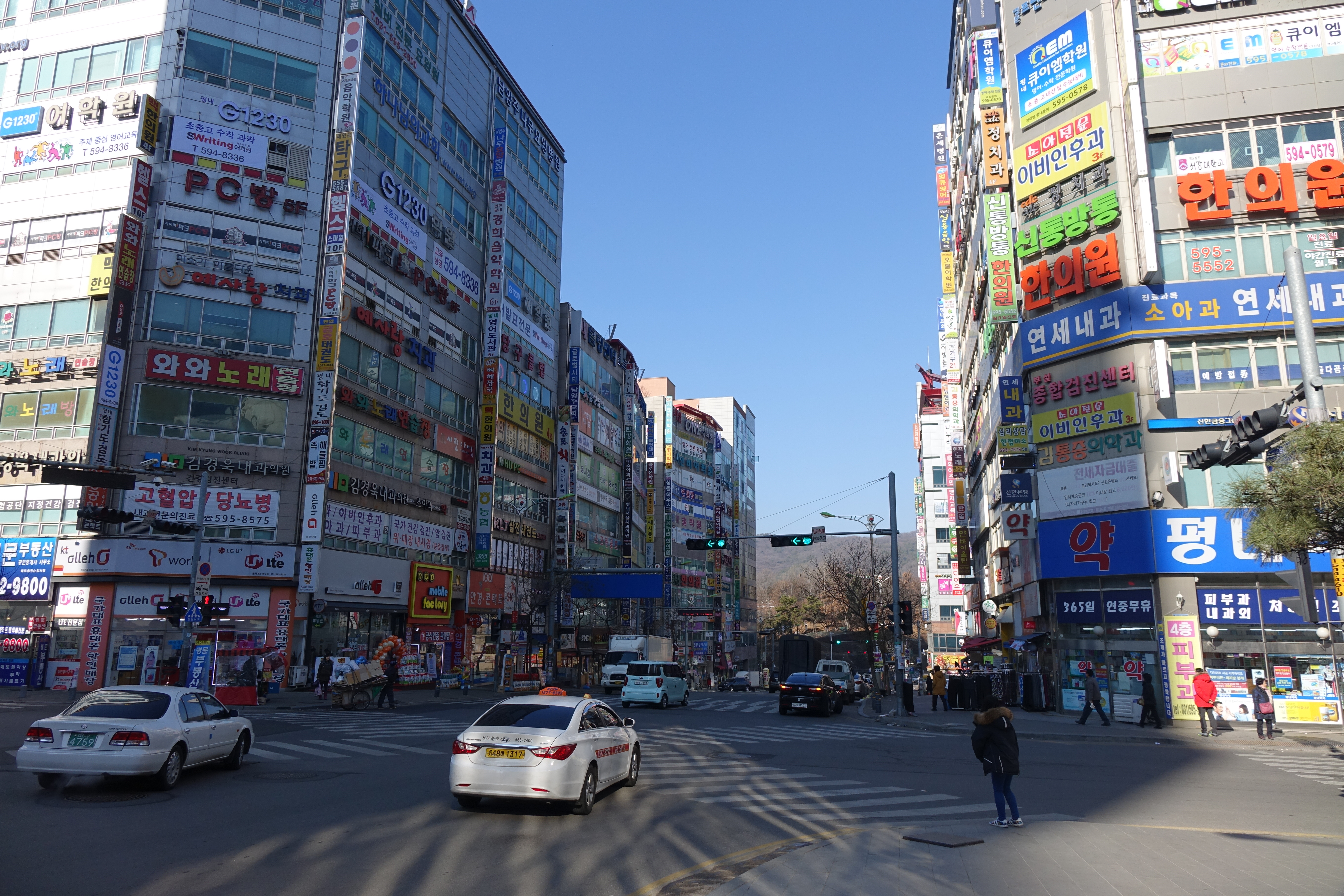 최광모 2015년 1월 12일 업로드